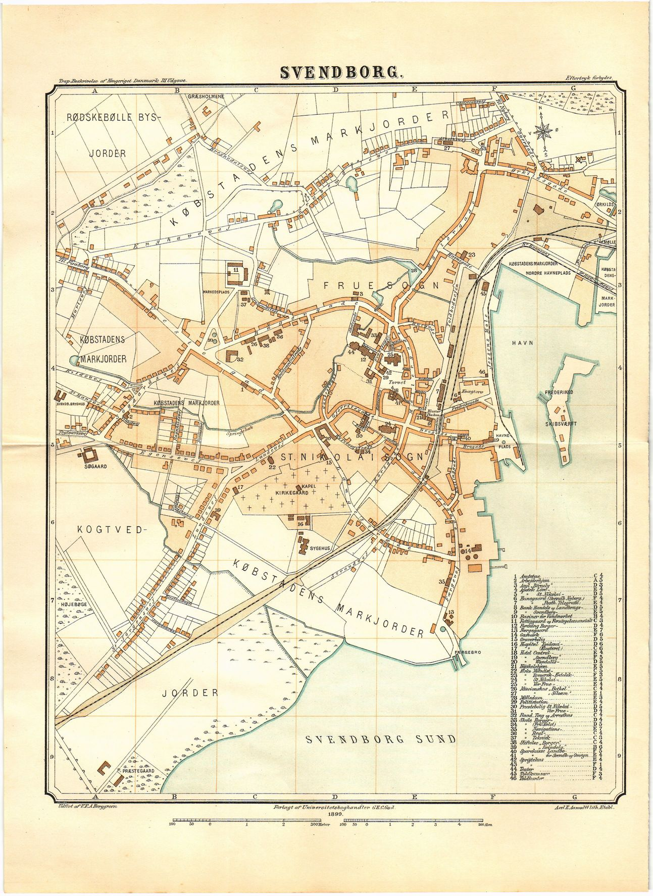 Kort over købstaden Svendborg 1899